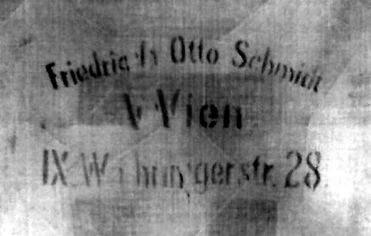 Original Stempelung eines Möbels von Friedrich Otto Schmidt, Wien